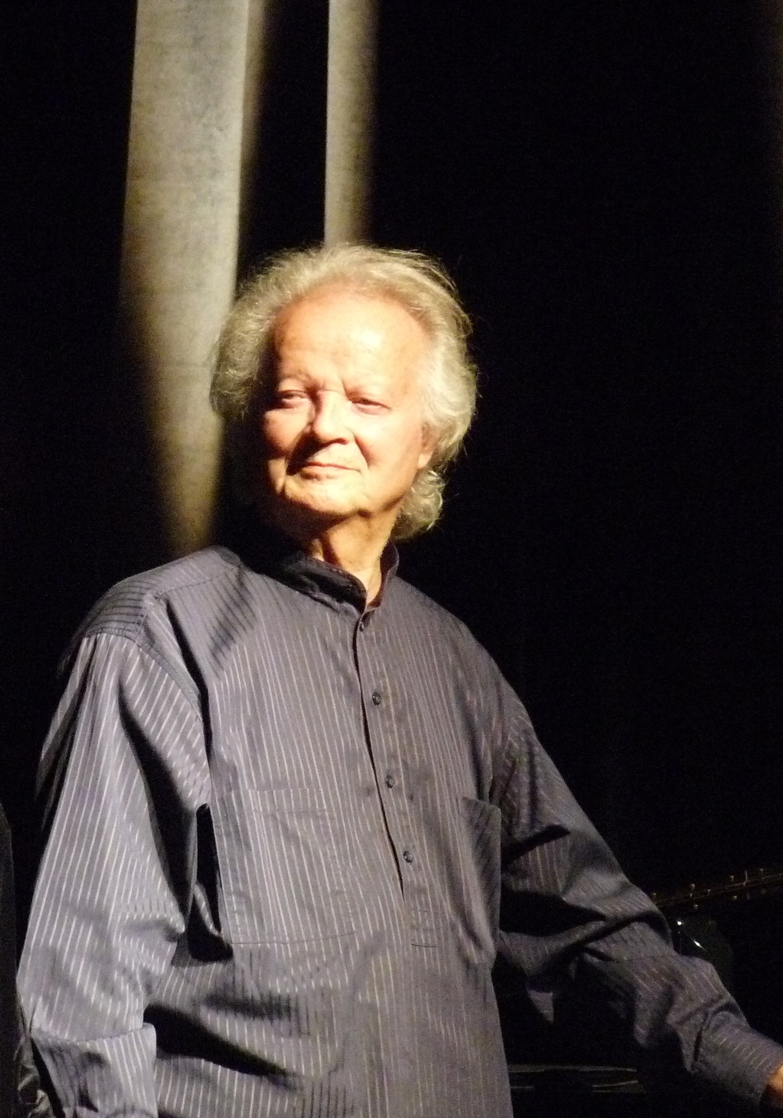 Le pianiste français Gérard Jouannest, pianiste de Jacques Brel et Juliette Gréco, en octobre 2011.